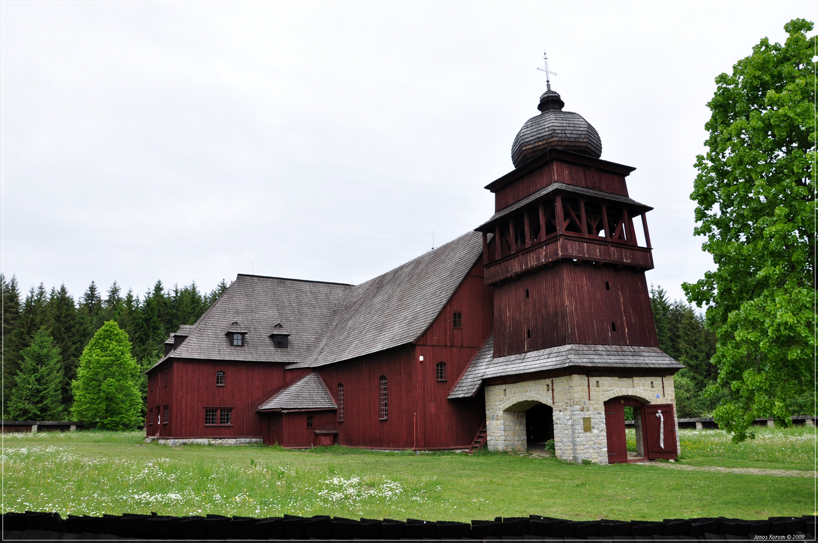 Artikularkirche in Svätý Kríž im Kreis Liptovský Mikuláš